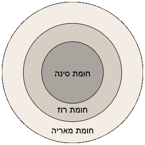 שמות 3 החומות מסדרת האנימה מתקפת הטיטאנים.